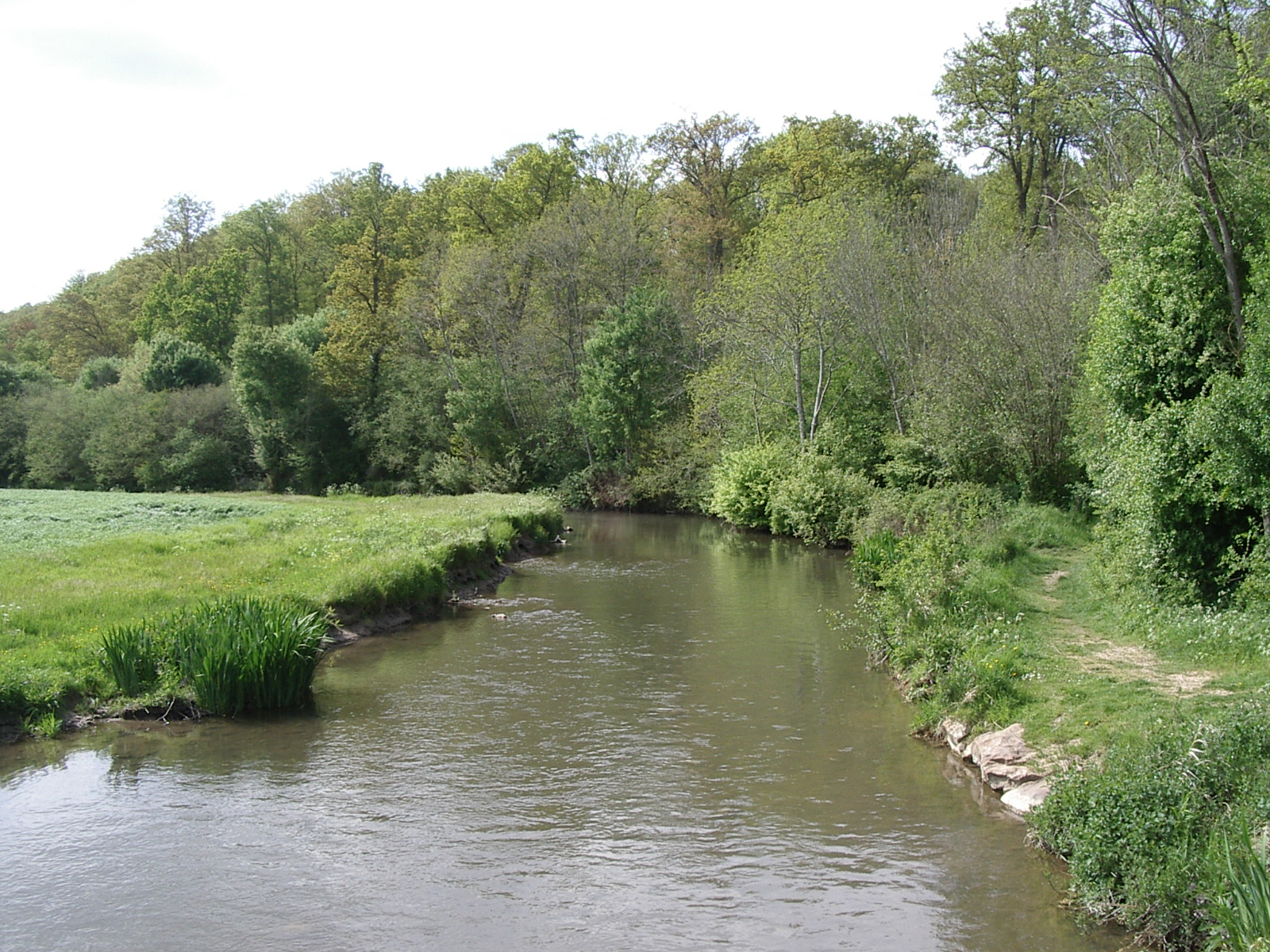 La Risle sur le territoire du Noyer-en-Ouche (France, Eure)